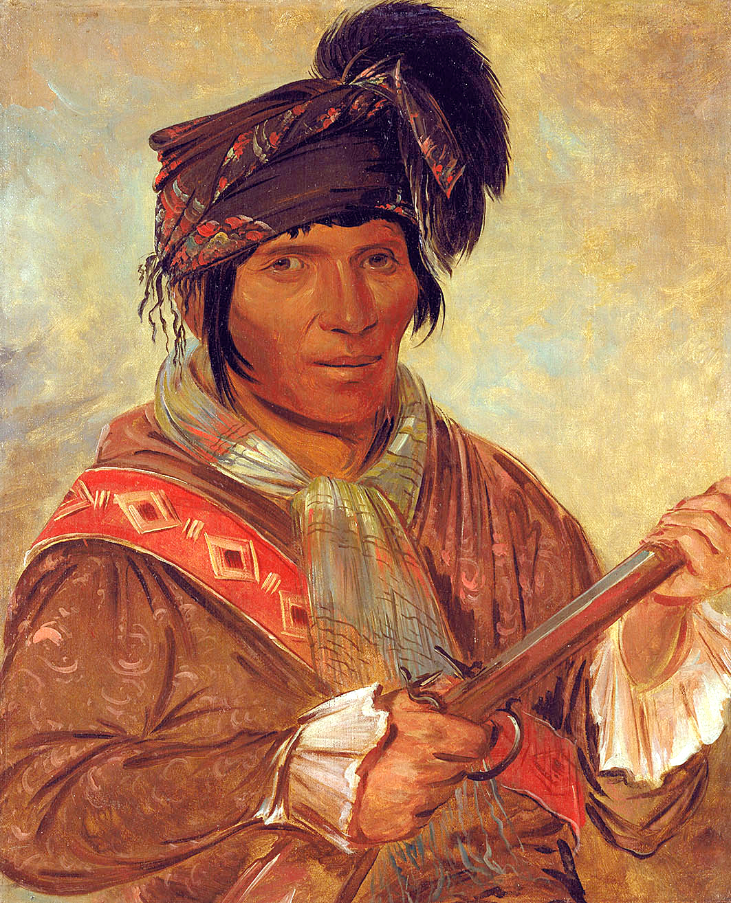 Co-ee-há-jo, a Seminole Chief